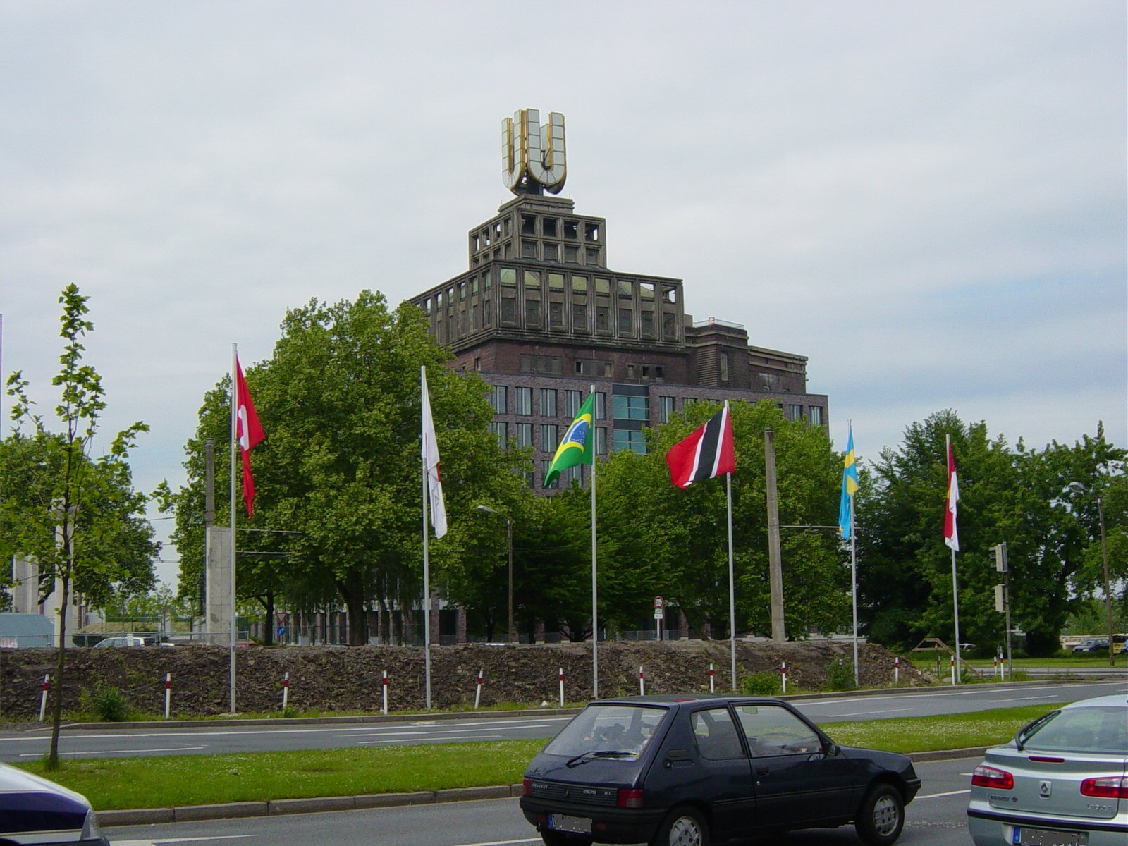 Dortmunder U